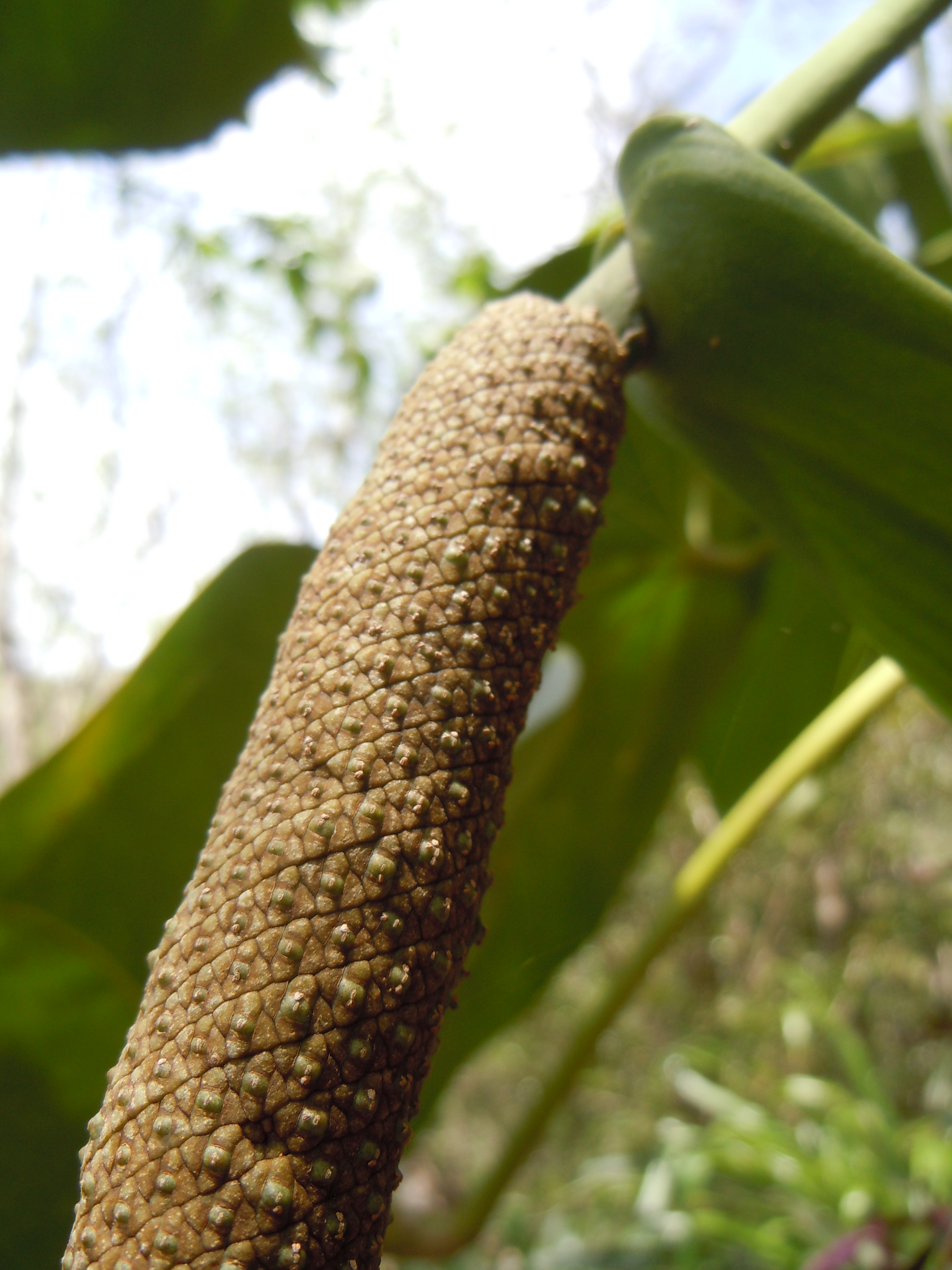 Anthurium grandifolium - Guadeloupe - Forêt de Malendure à Anse Colas - Bouillante: détail du spathe